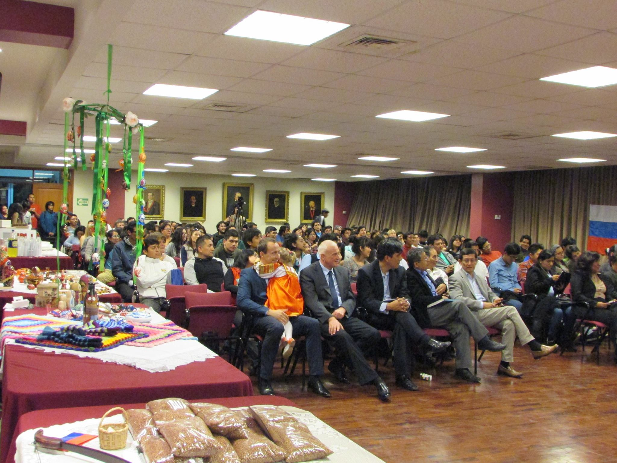 Evento Grupo Asia (5)